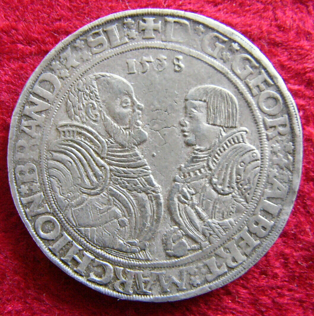 Münze mit dem Markgrafen Georg dem Frommen als Vormund mit Albrecht Alcibiades